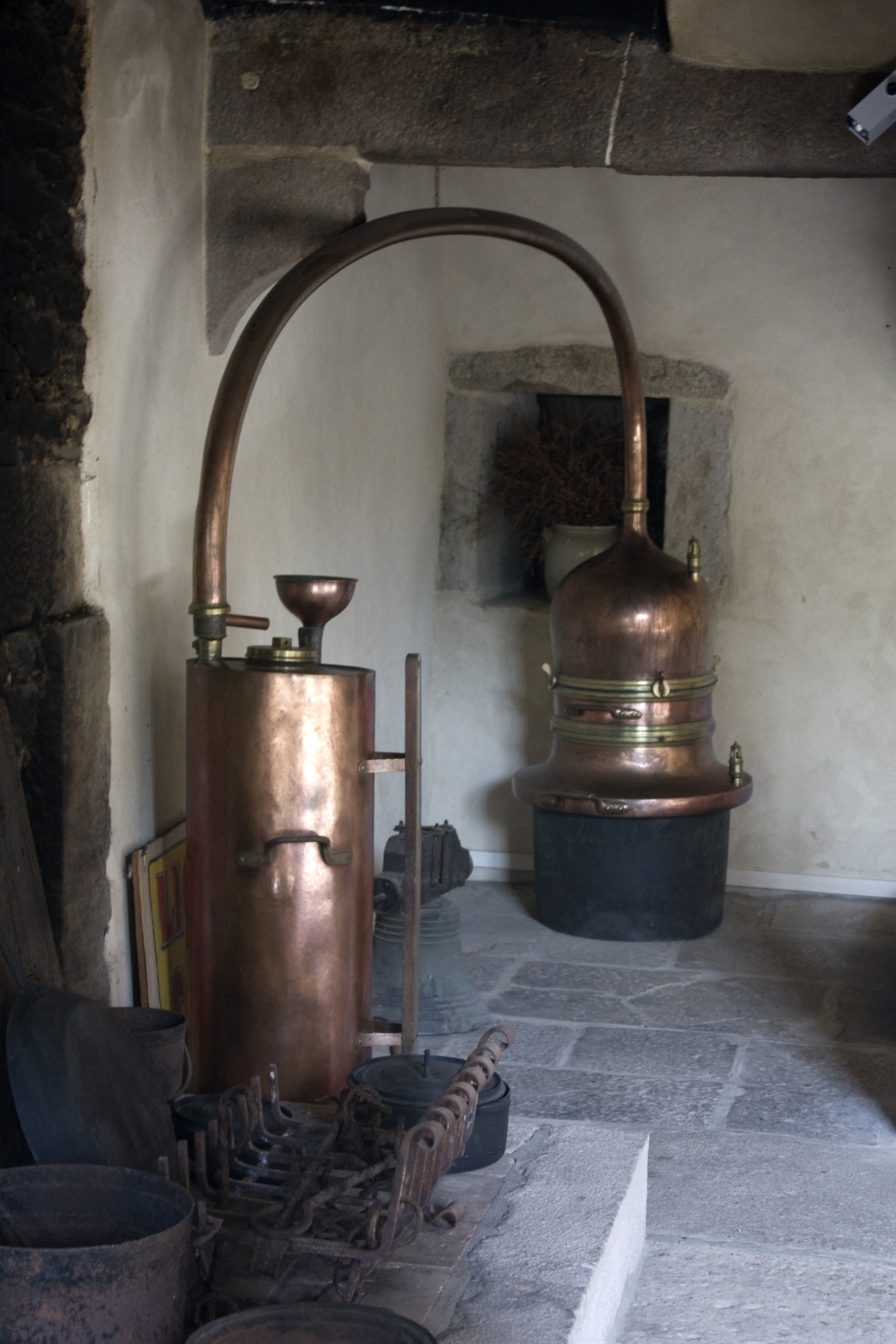 Parmi les ressources des ordres monastiques, on trouvait souvent la production de liqueurs composées à partir d'herbes médicinales ...